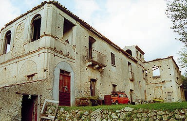 Foto antica del palazzo Vescovado